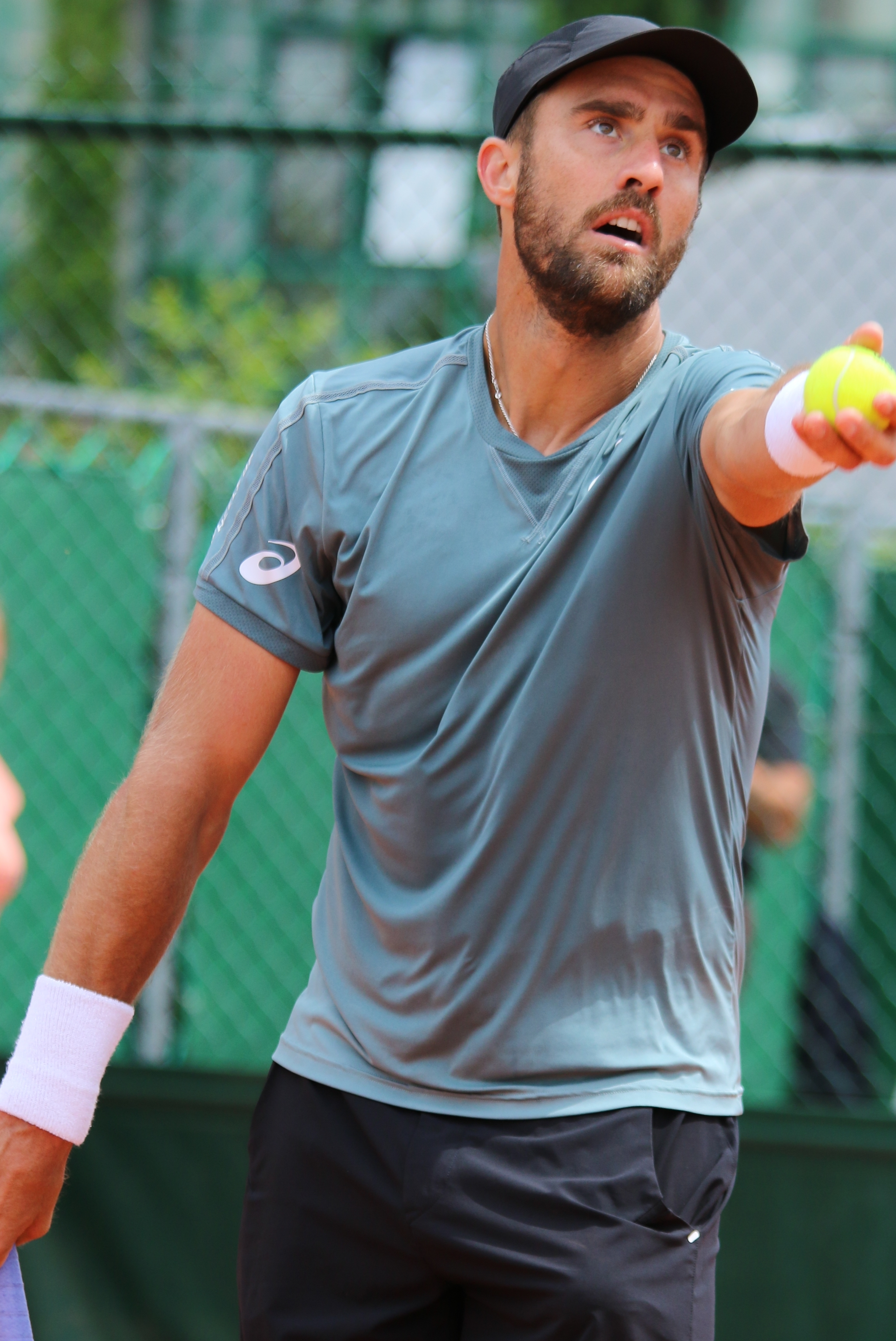 Johnson RG18 (7)